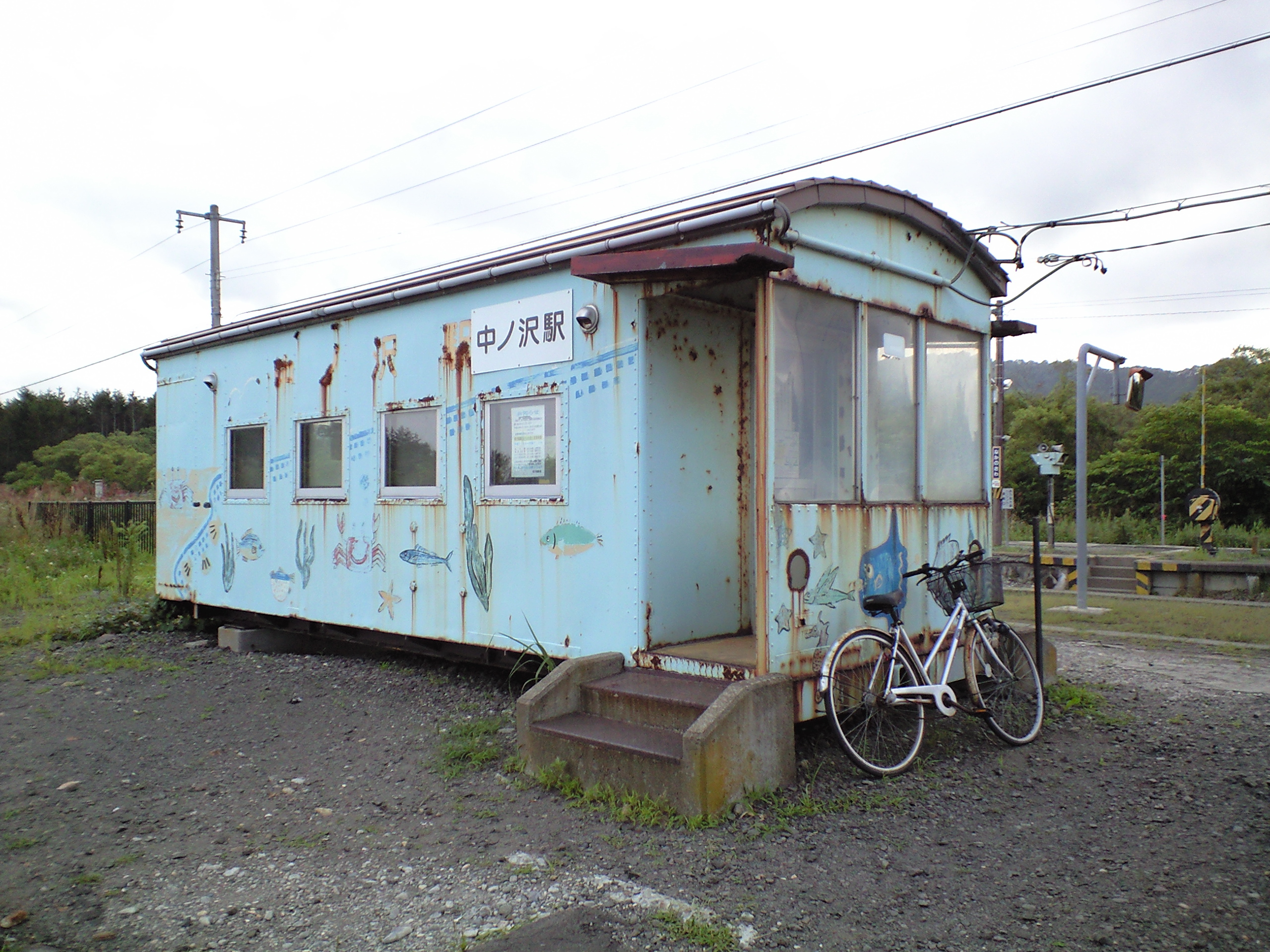 北海道山越郡長万部町字中ノ沢にある、函館本線・中ノ沢駅の駅舎。